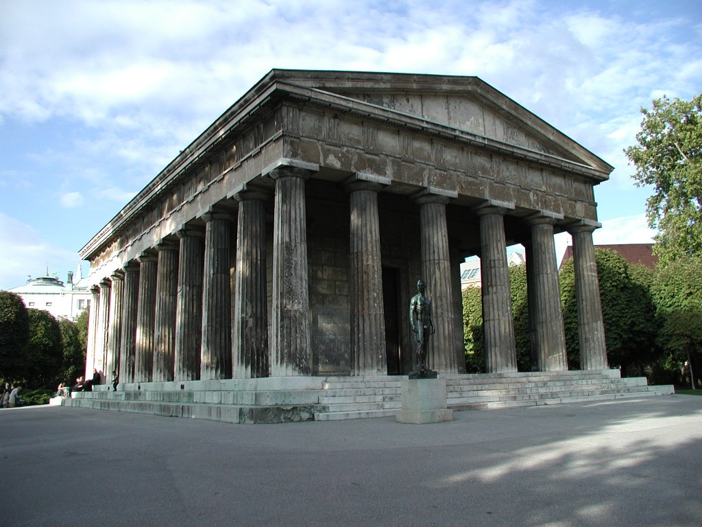 Beschreibung: Der "Theseustempel" im Wiener Volksgarten Fotograf: Alexander Mayrhofer Quelle: selbst fotografiert, September 2004 Lizenz: GNU-FDL